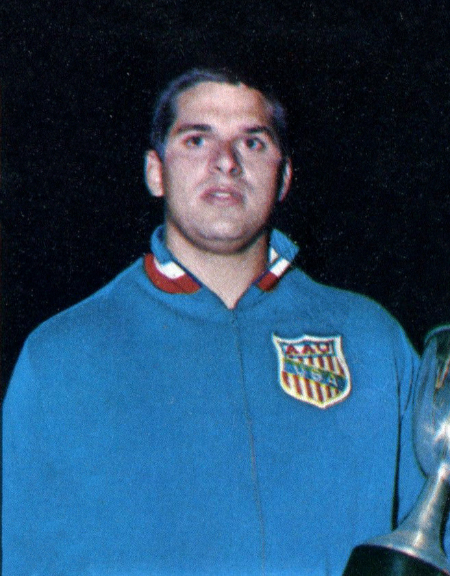 CAMPIONI DELLO SPORT 1968/69 - n. 48 - STEINHAUER - USA